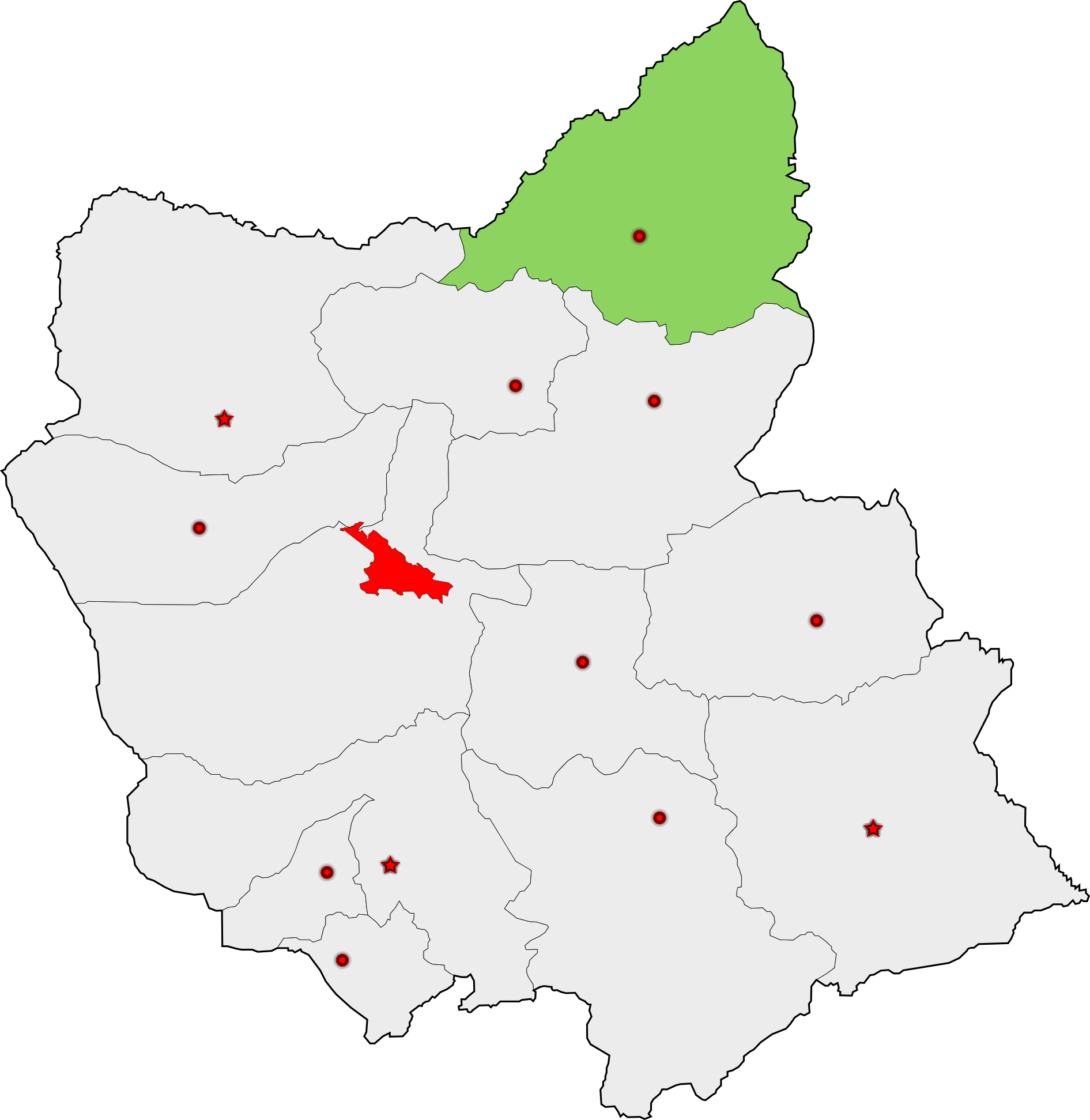 حوزهٔ انتخاباتی کلیبر و هوراند برای انتخابات مجلس شورای اسلامی